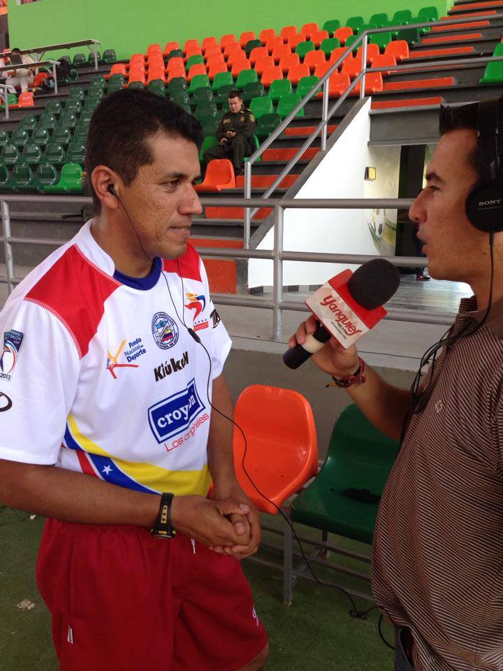 Oscar Villamizar Maldonado (San Cristobál-Tachira, Venezuela, 02 de Octubre de 1974) es un destacado entrenador de Futsal, que en la actualidad dirige técnicamente la Selección Nacional Femenina de Fútbol de Salón de su país. Como entrenador inicio su carrera en el año 1990 en el Club de Futsal Juventus DPCP, en el año 1995 represento por primera vez a su estado en un torneo nacional categoría Infantil "B" masculino, se destacó como entrenador de las Selecciones de Fútbol de Salón y Fútbol Sala del estado Tachira tanto en la modalidad femenino como masculino desde 1995 al 2013, en la Liga Nacional de Fútbol Sala con los clubes Deportivo Tachira F.S (2009). Grajeritos del Tachira (2010), Pontalidos de Junin (2011), en el Torneo Superior de Futsal Copa Directv Fue asistente del Deportivo Tachira F.S (2013) Logrando el Sub Campeonato, en al año 2011 es nombrado por la FEVEFUSA entrenador de La selección Venezuela Femenina con miras a participar en el II Mundial Femenino Colombia 2013, torneo en el cual logro el Sub Campeón Mundial,a participado en 54 Campeonatos Nacionales de los cuales ha logrado 11 Campeonatos y 14 Sub-Campeonatos, 4 Competencias Internacionales, Campeón de los Juegos Binacionales (2006)y el Sub Campeonato del Mundial Femenino Colombia 2013. Estos títulos lo convierten en uno de los directores técnicos más ganadores en la historia del Fútsal Venezolano.